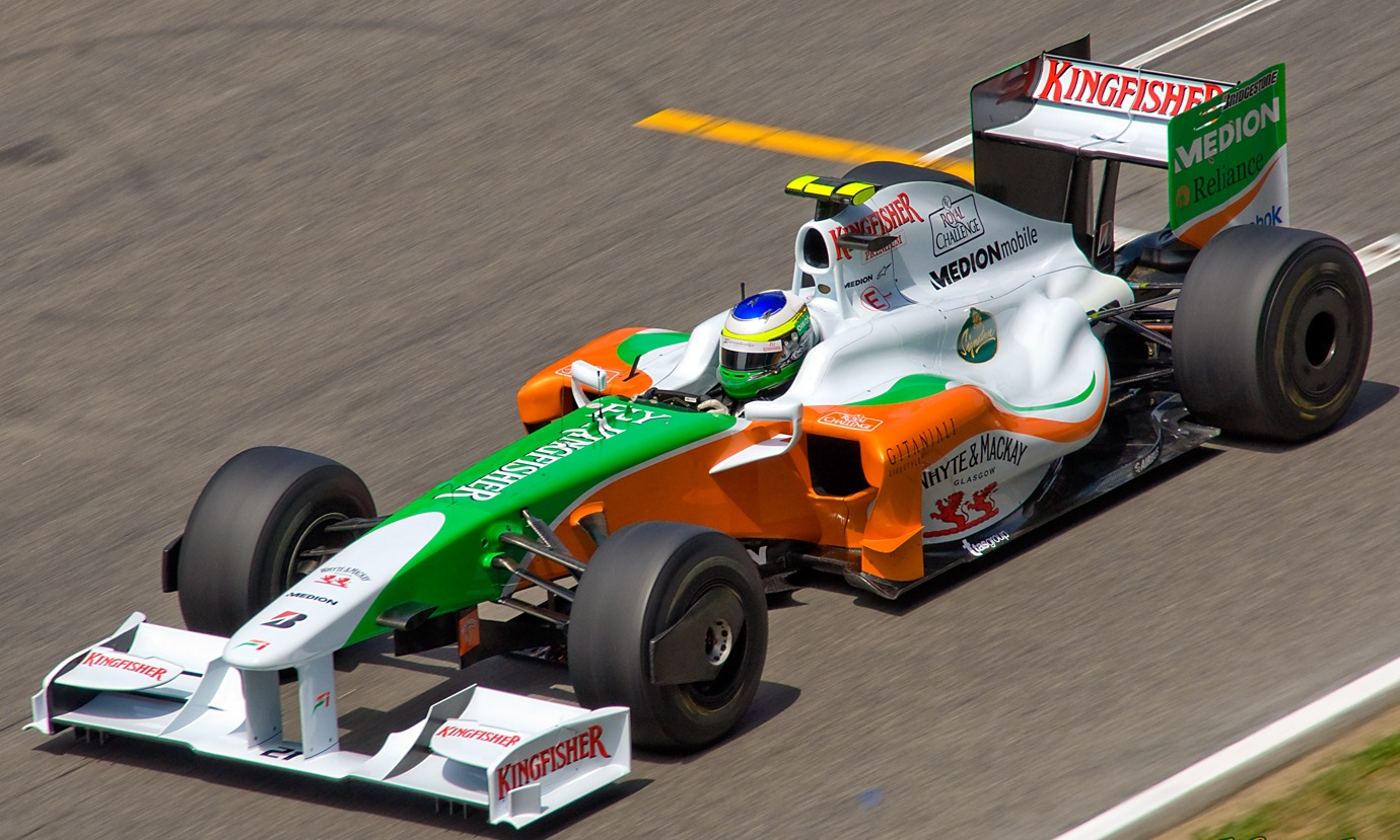 Nikon D90 + Sigma 18-200 DC OS HSM 1/800s - F/13 - 200mm - ISO640